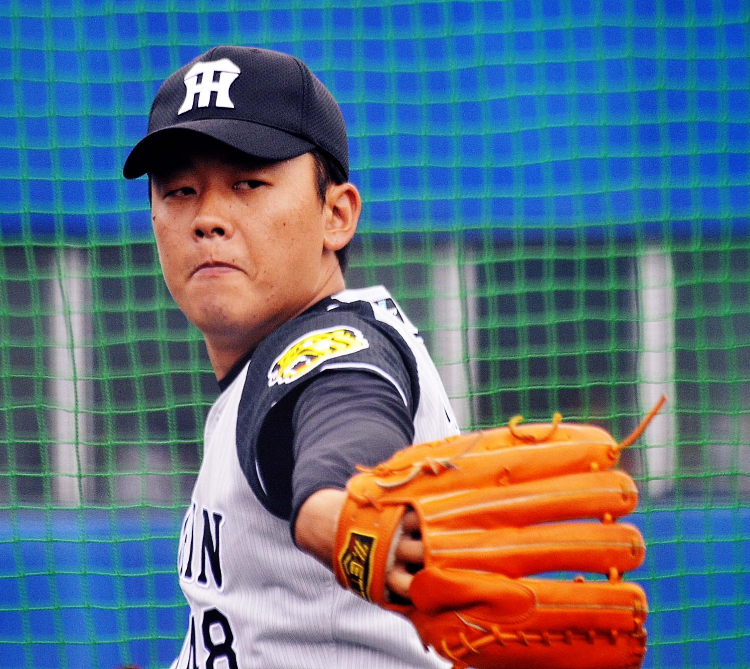 阪神タイガースの金田和之投手